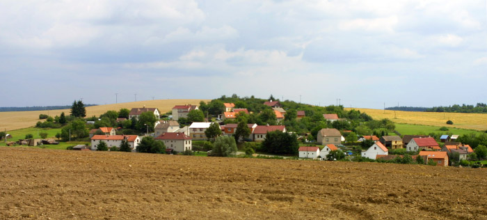 Pohled na horní část Horního Hradiště od západu. Autor: Adam Hauner Datum: 5. 8. 2006